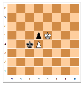 Trebucher